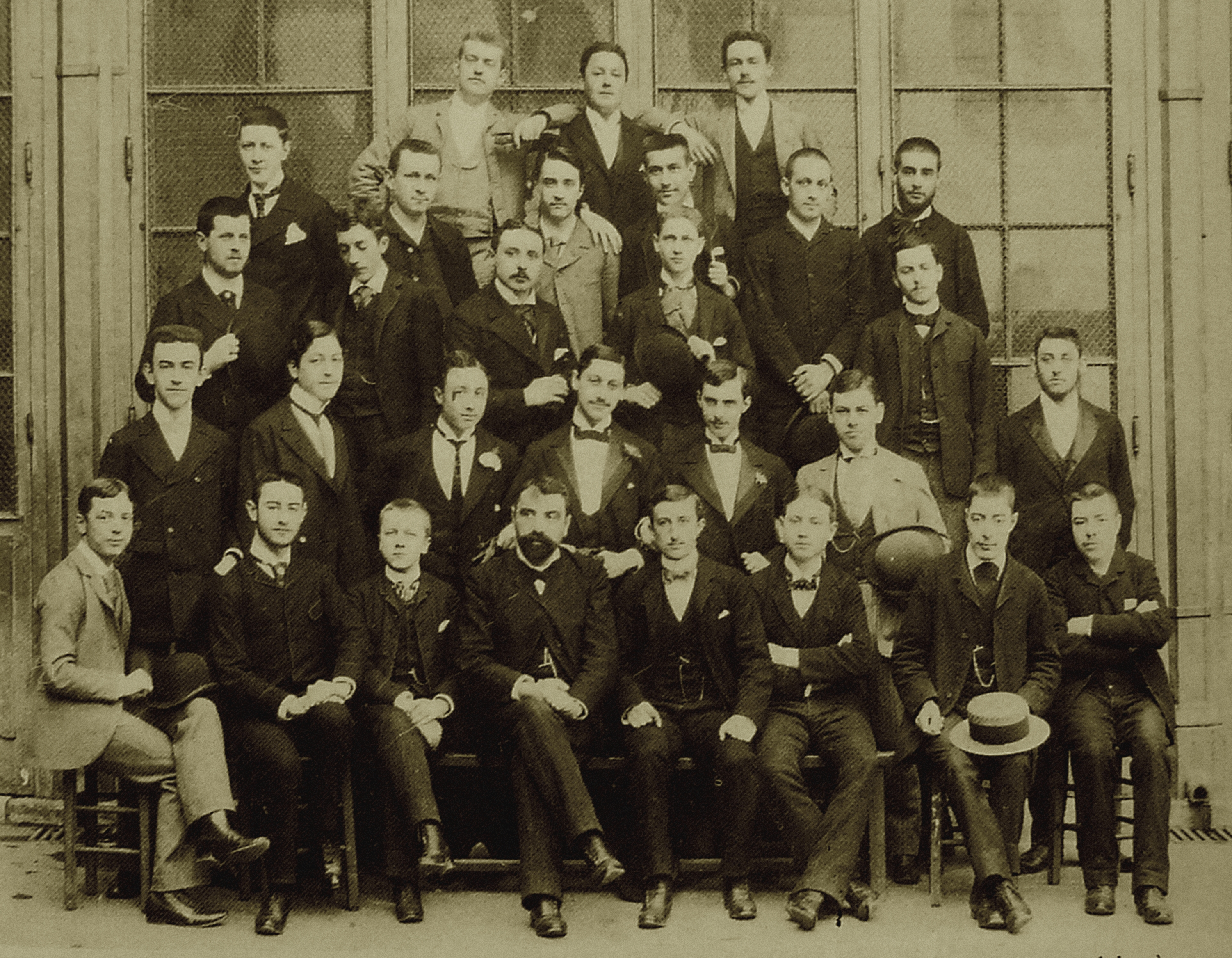 Photo de la classe de philosophie en 1890 au lycée Condorcet (Paris). Photo de Pierre Petit sur carton 19 cm x 25,5 cm (recadré pour ce fichier). Les noms des élèves sont notés au dos, notamment Robert Dreyfus (rang 1, extrême gauche), Alphonse Ducatel (professeur), Hippolyte Dreyfus-Barney (rang 2, 5e), Abel Desjardin fils (rang 3, 1er),Paul Baignières (rang 3, 2e), Robert Proust (rang 4, extrême droite). Collection Mante-Proust pour l'original (Vente Sotheby's 31 mai 2016).